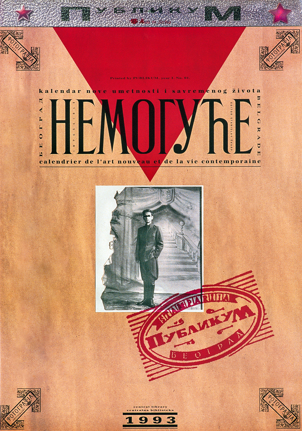 Насловна страна првог Публикум календара нове уметности "Немогуће" са радовима Станислава Шарпа, 1993.